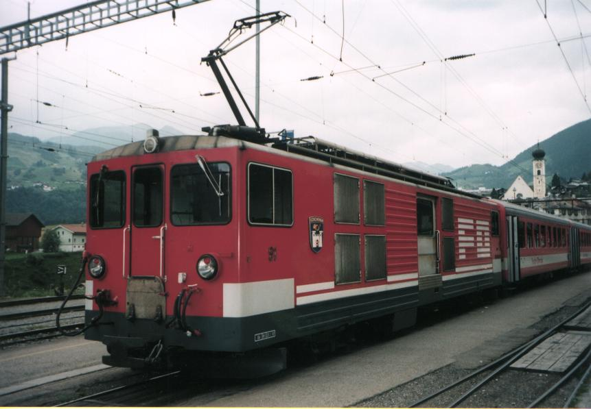 Furka-Oberalp-Bahn (FO) Gepäcktriebwagen Deh 4/4 91 in Disentis